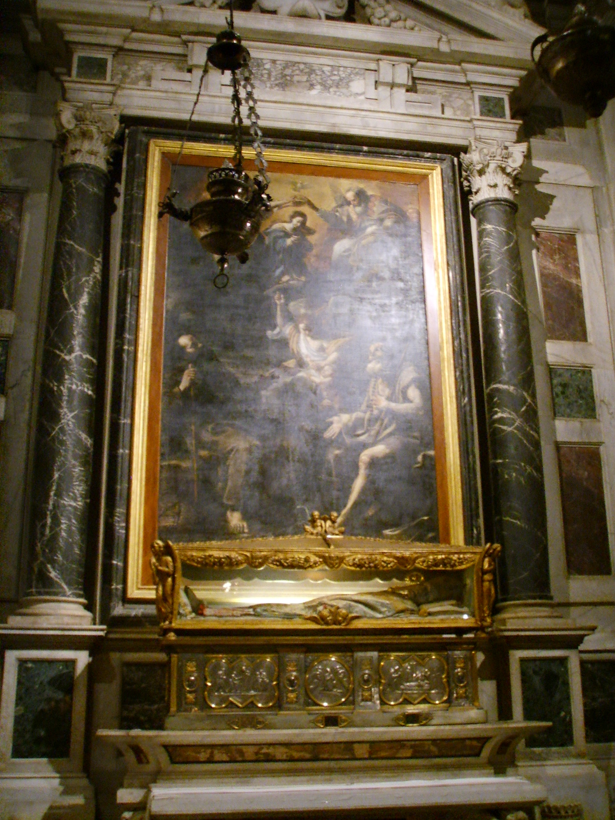 Pistoia, duomo, cappella di san Atto, mattia preti, incoronazione della vergine